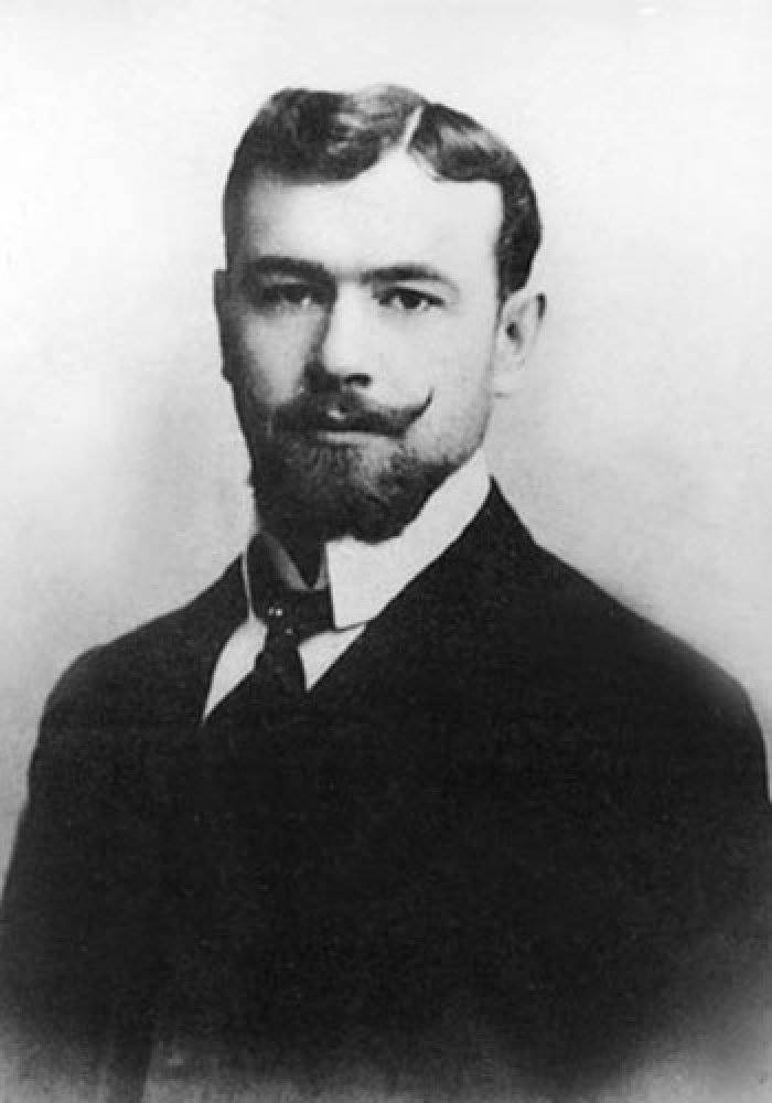 Александр Алексеевич Ханжонков